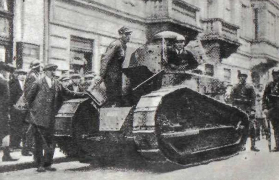 Czołg Renault FT-17, który przełamał pozycje wojsk rządowych w warszawskich Alejach Ujazdowskich podczas przewrotu majowego w 1926 roku.